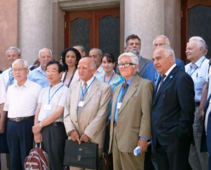 Участники конференции в Физико-Техническом НИИ Академии наук Таджикистана